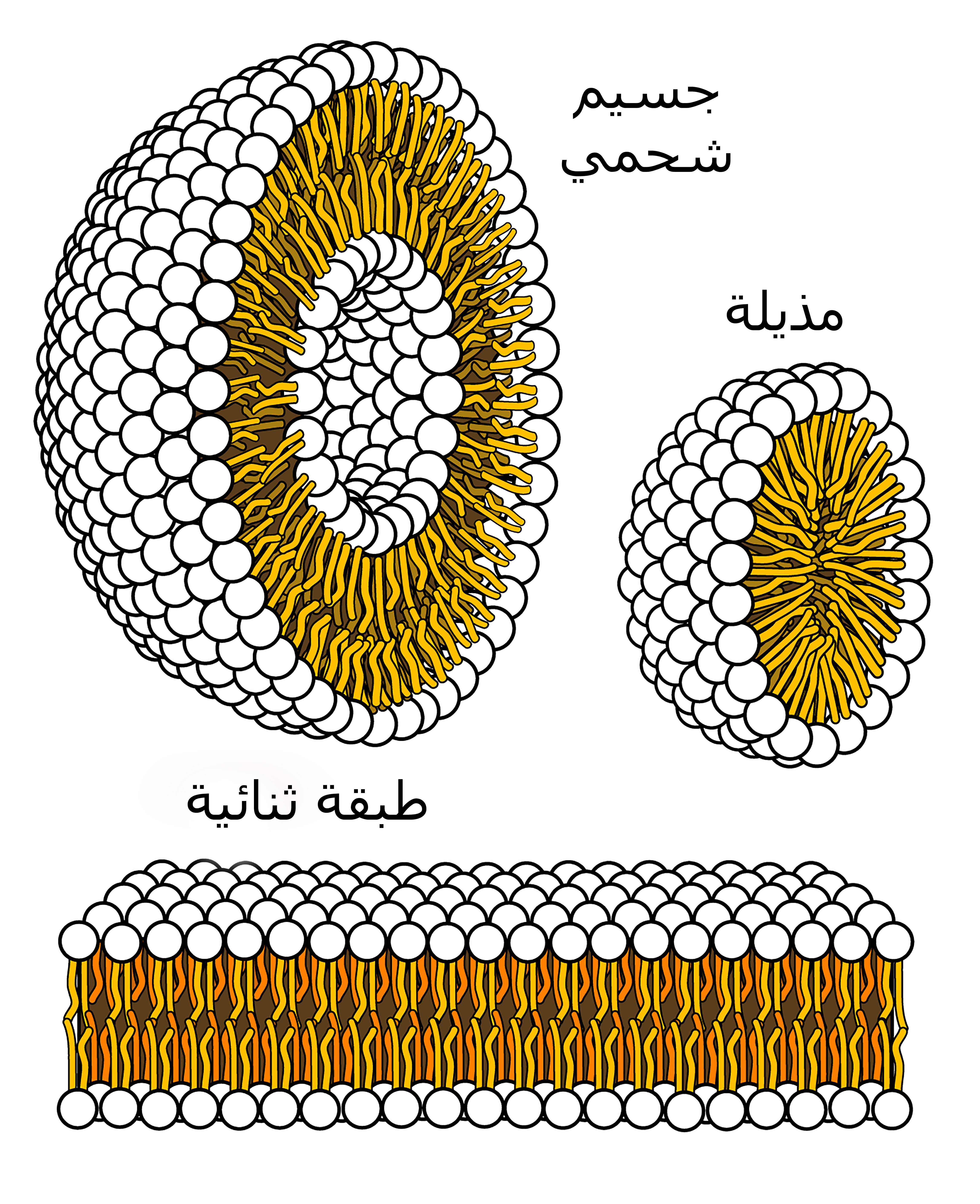 قطاع عرضي يظهر التركيبة التي يمكن أن تتشكل من الشحميات الفسفورية في محلول مائي